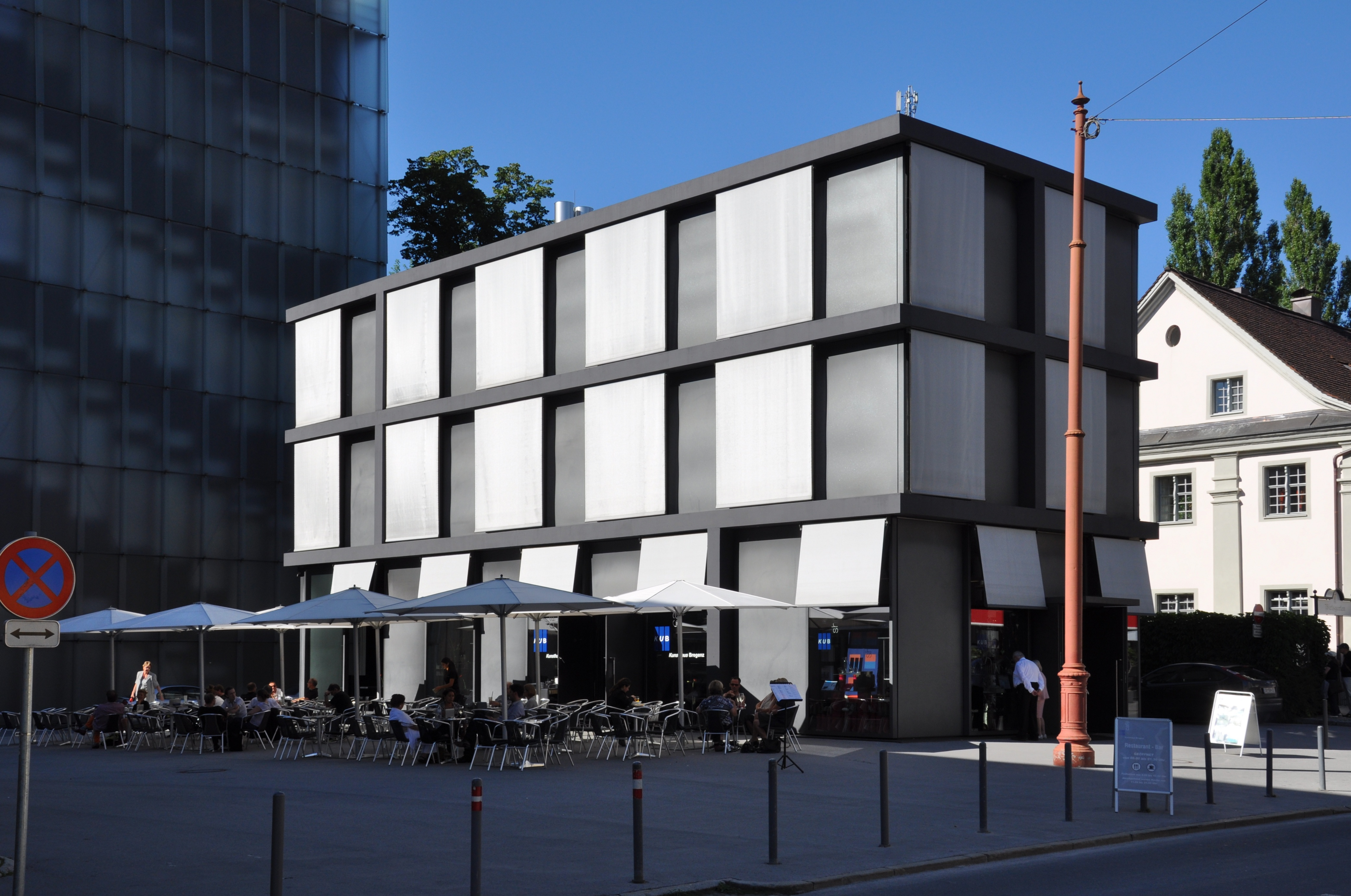 Bregenz, Nebengebäude (Café, Shop) des Kunsthauses Bregenz am Kornmarkt